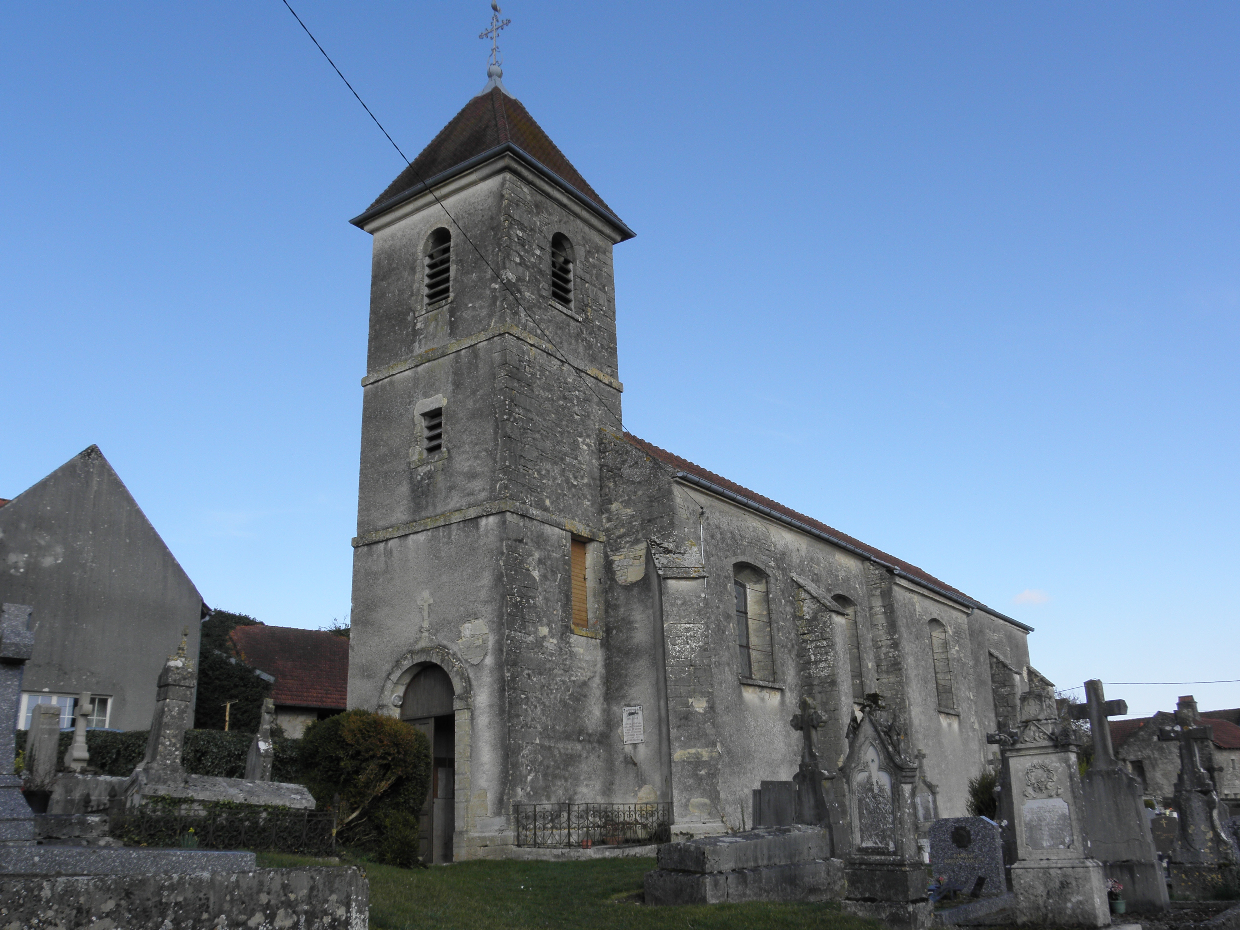 Eglise Saint Martin 1